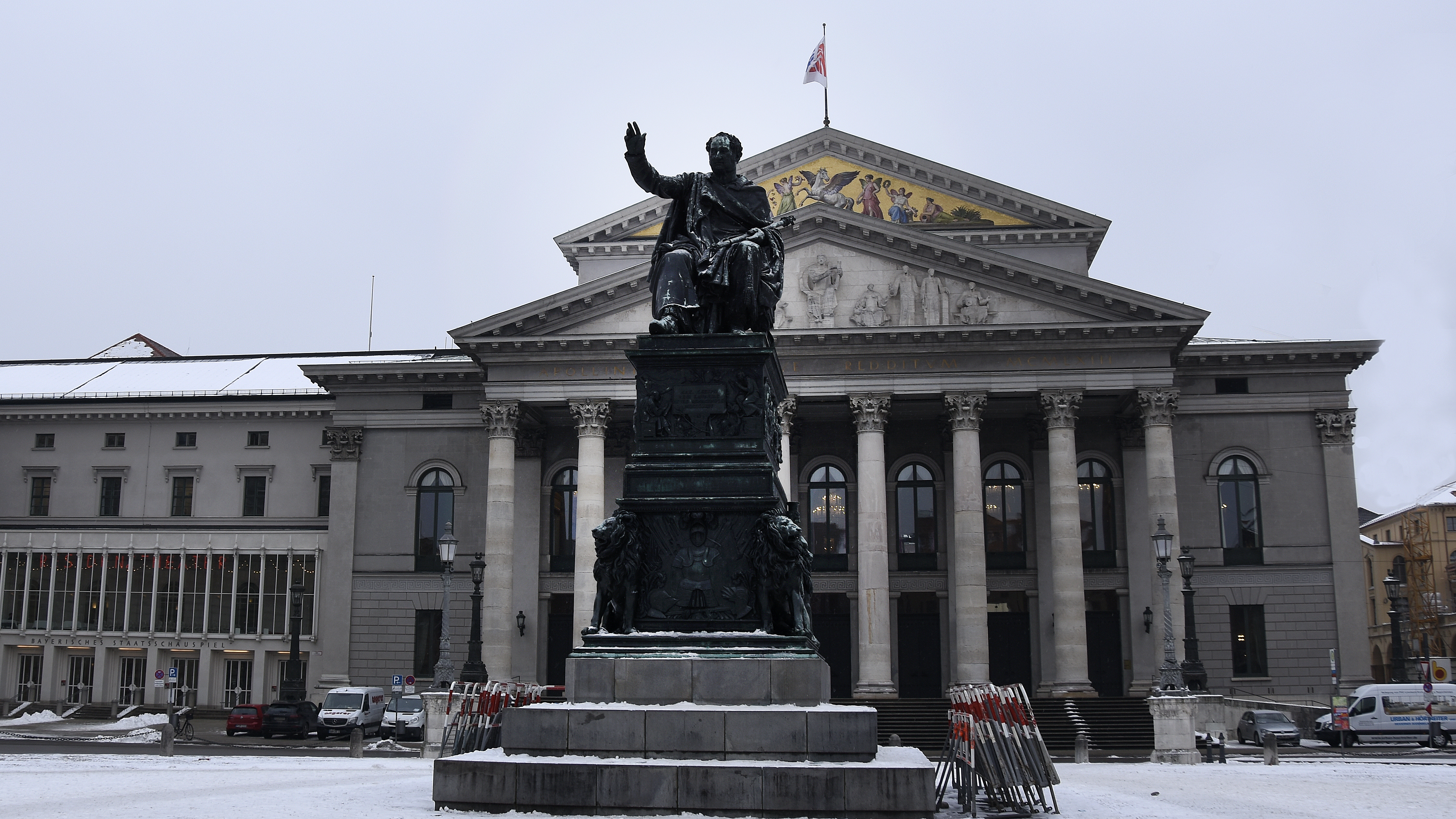 Maximiliaan I Jozef van Beieren - Max-Joseph Platz - München gemaakt door Johann Baptist Stiglmaier (1791-1844)